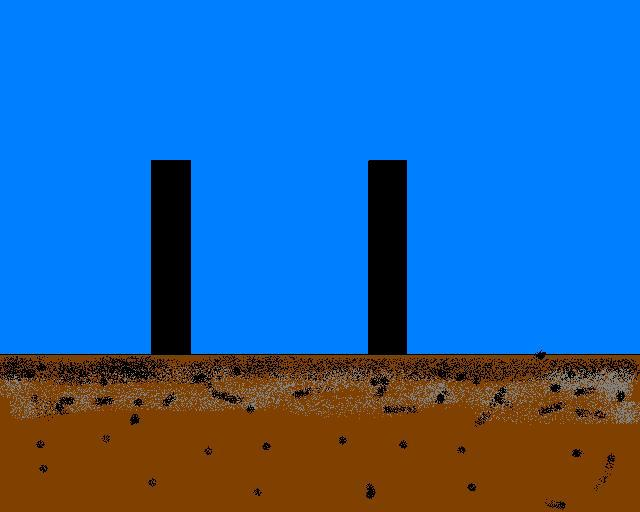 凸堤效應步驟二